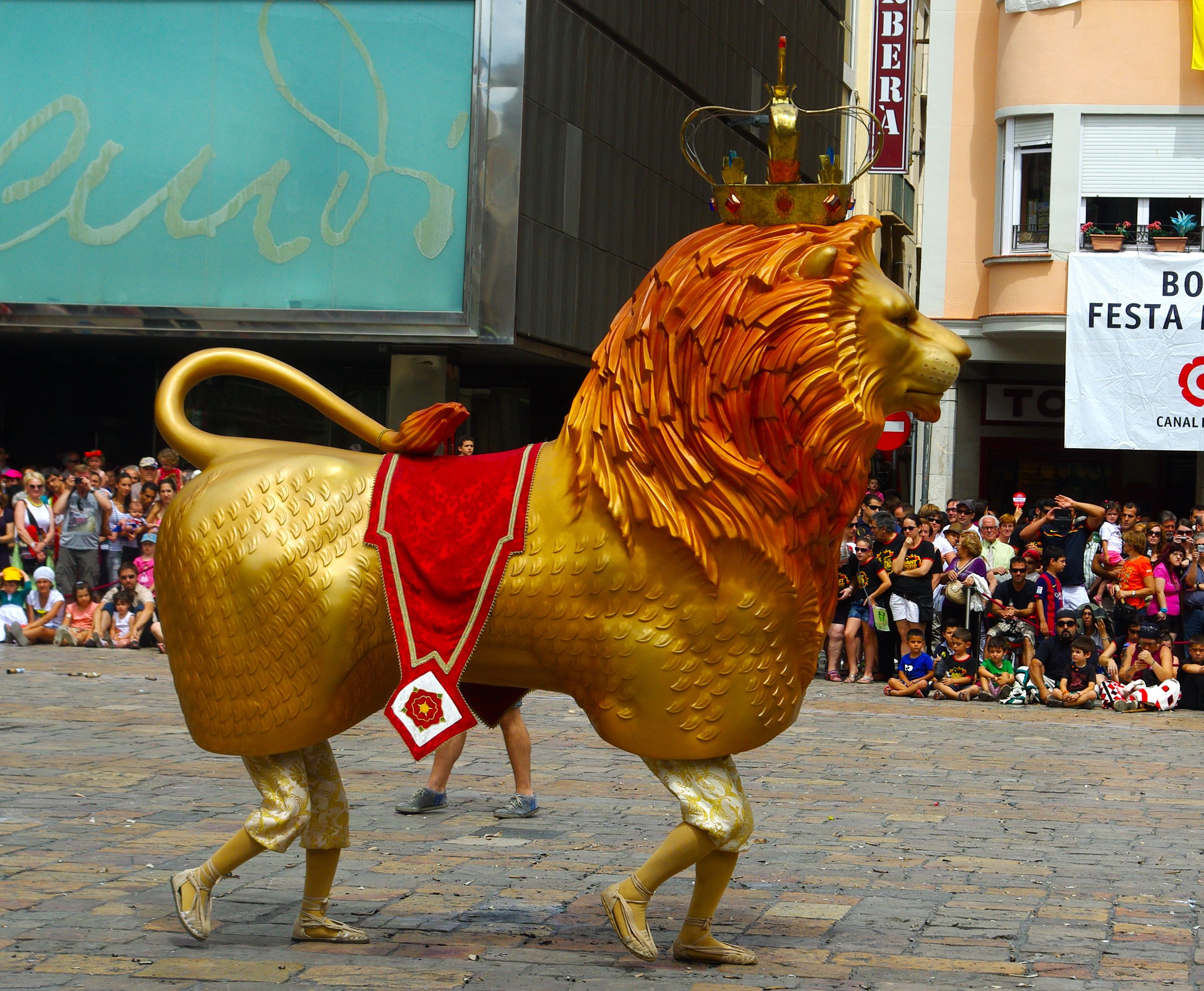 El Lleó de Reus. Sant Pere 2014